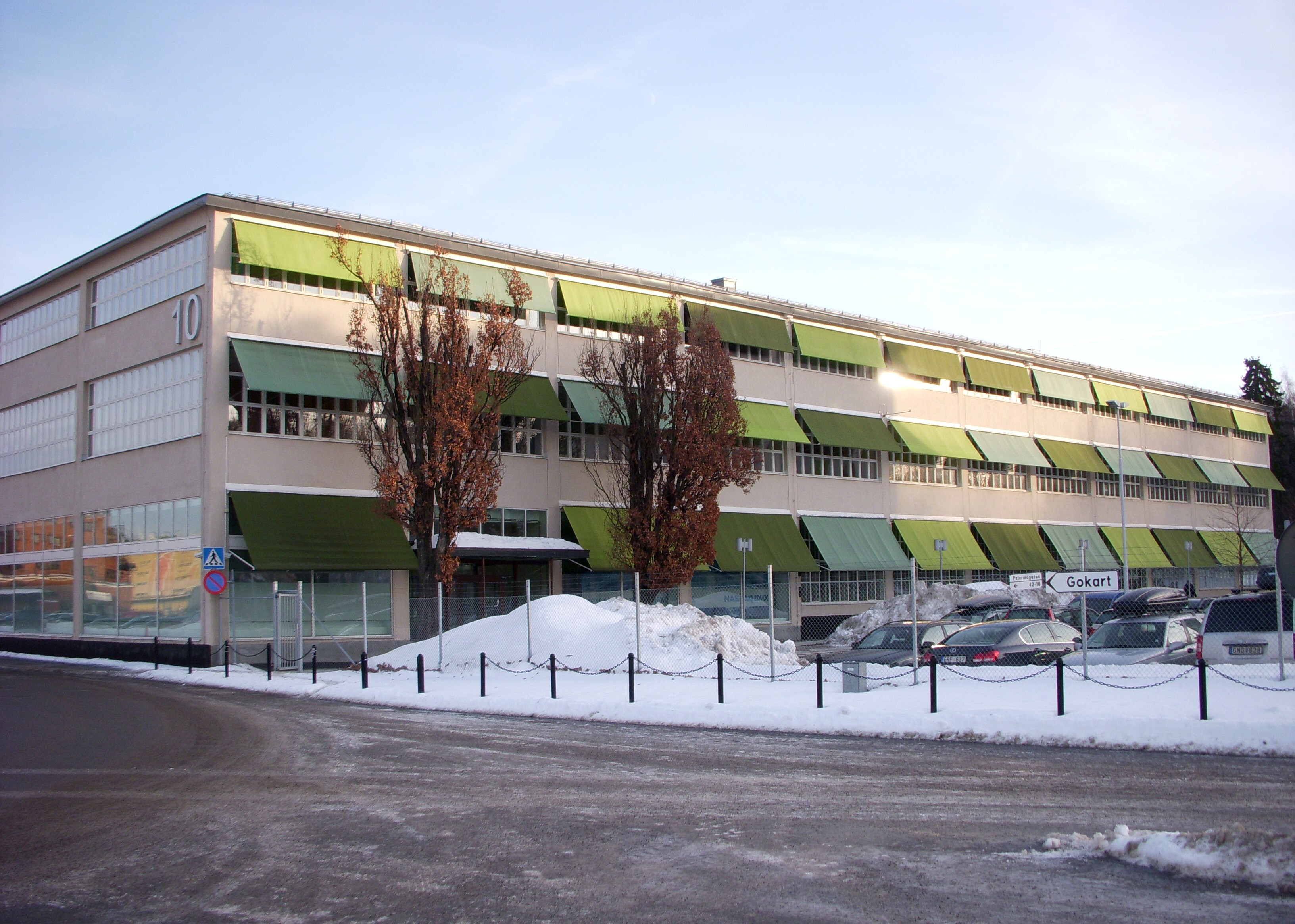 Stockholms Frihamn, f.d. Fordbyggnaden numera Magasin 10